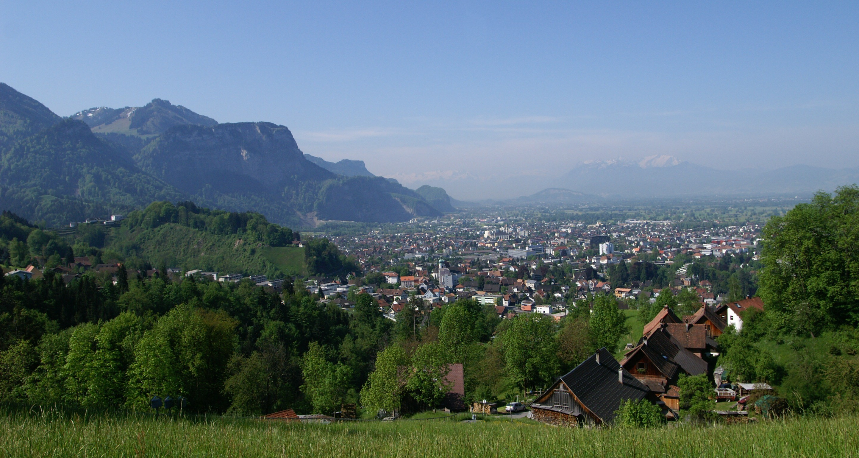 Blick vom Romberg auf DornbirnOberdorf (Dornbirn), Hatlerdorf und Hohenems.